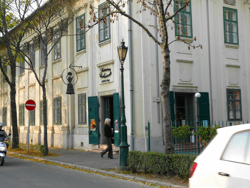 Gyula a 100 éves cukrászda